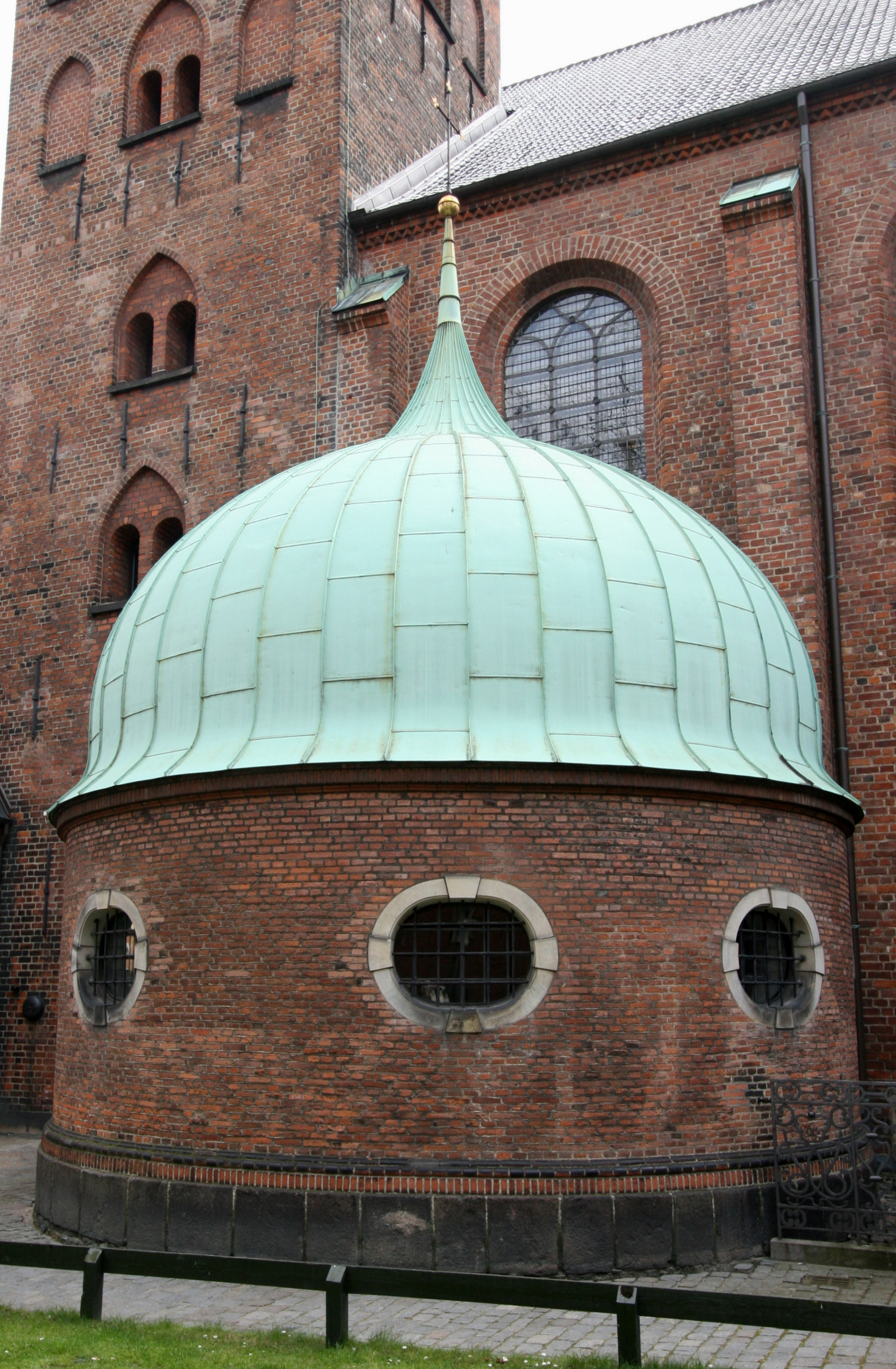 Helligåndskirken, Copenhagen, Denmark. Griffenfelds Chapel.